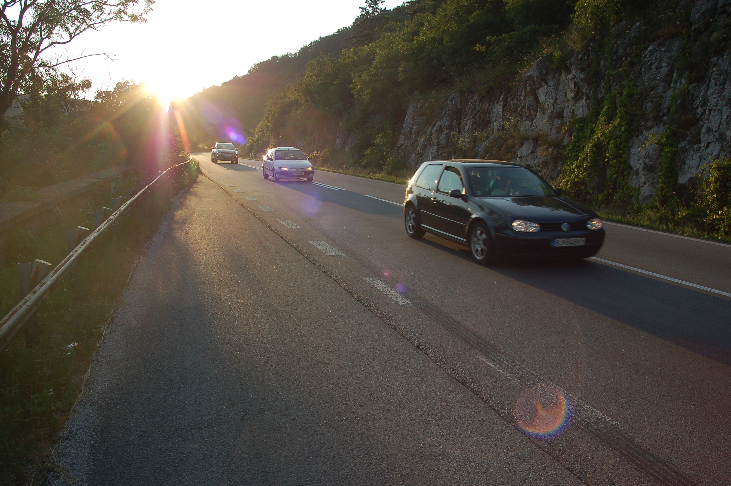 Cesta I/50 na horskom priechode Soroška